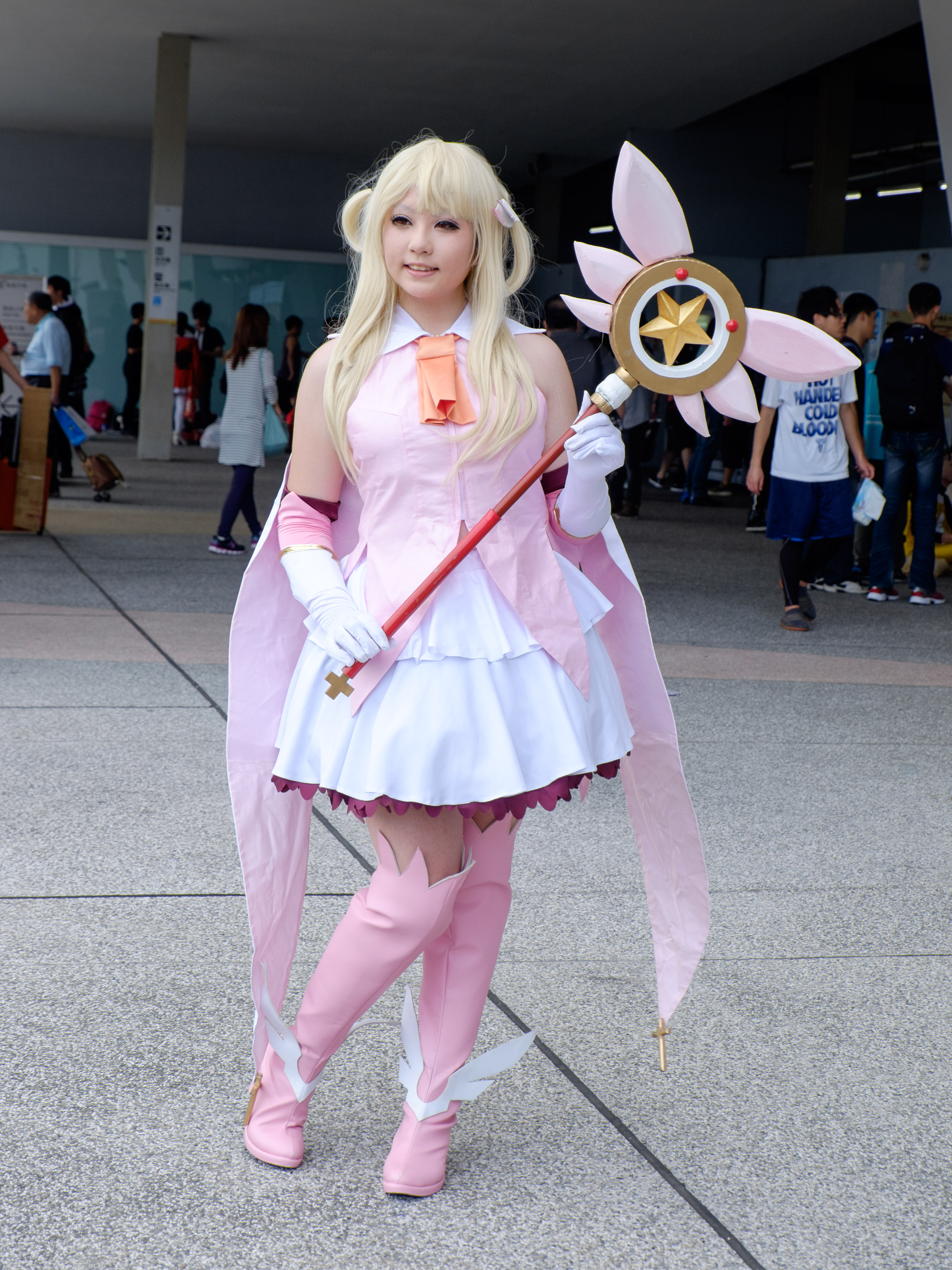 PF22＜プリズマ☆イリヤ＞魔法少女伊莉雅Cosplayer。